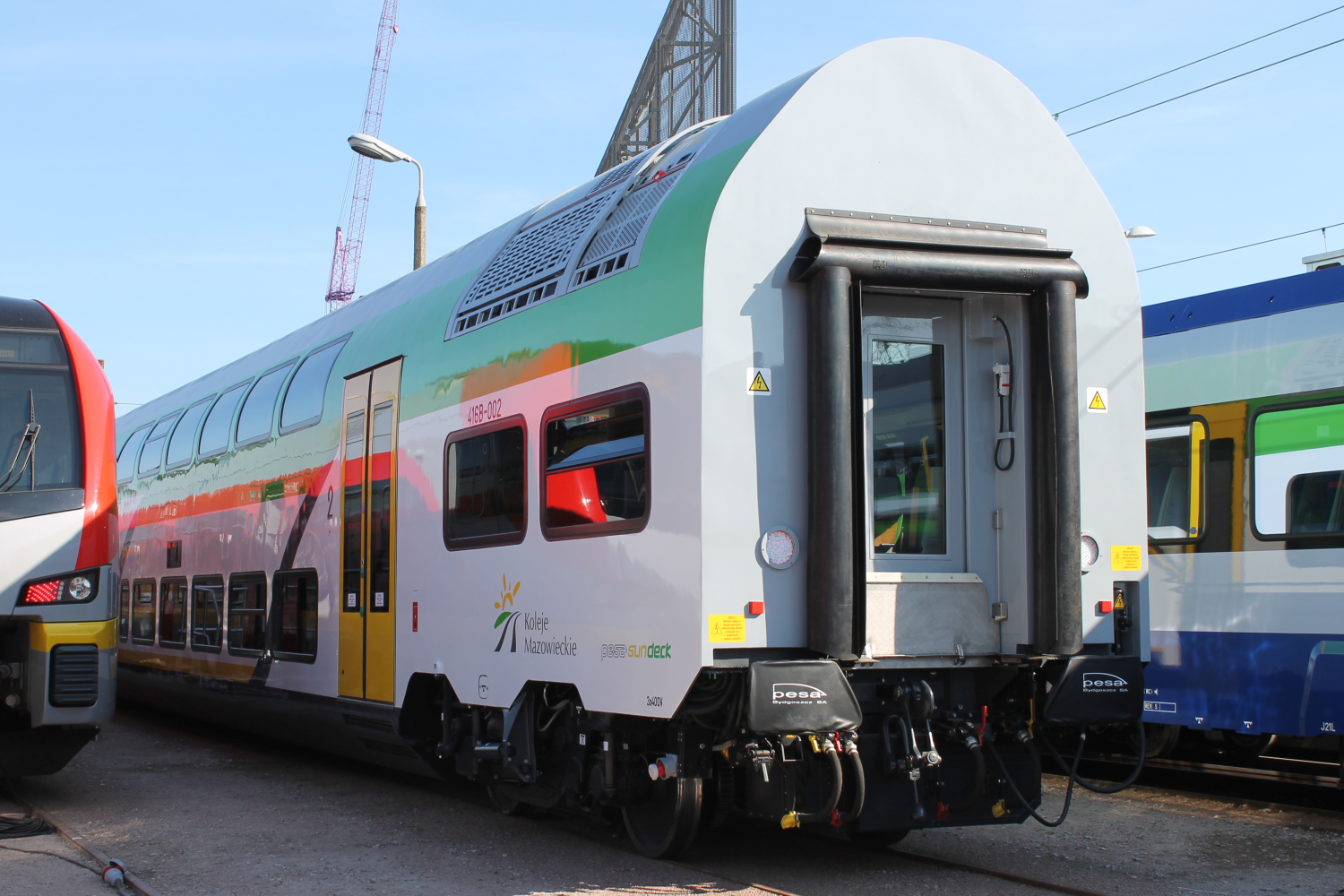 Środkowy wagon piętrowy Pesa Sundeck 416B-002 podczas targów Trako 2015. The making of this document was supported by Wikimedia Polska Association, within Wikigrant no. WG 2015-34.